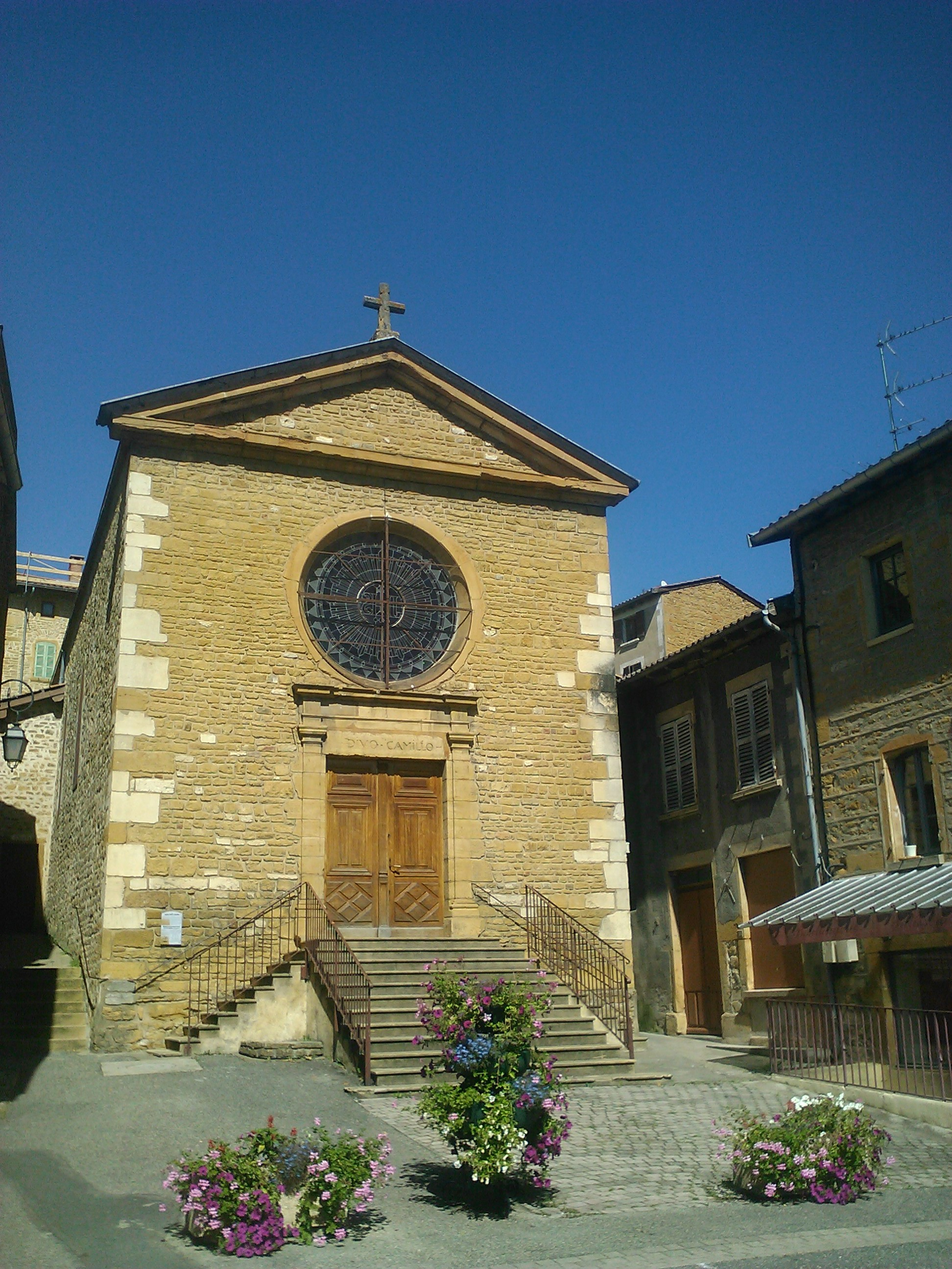 Façade de Châtillon